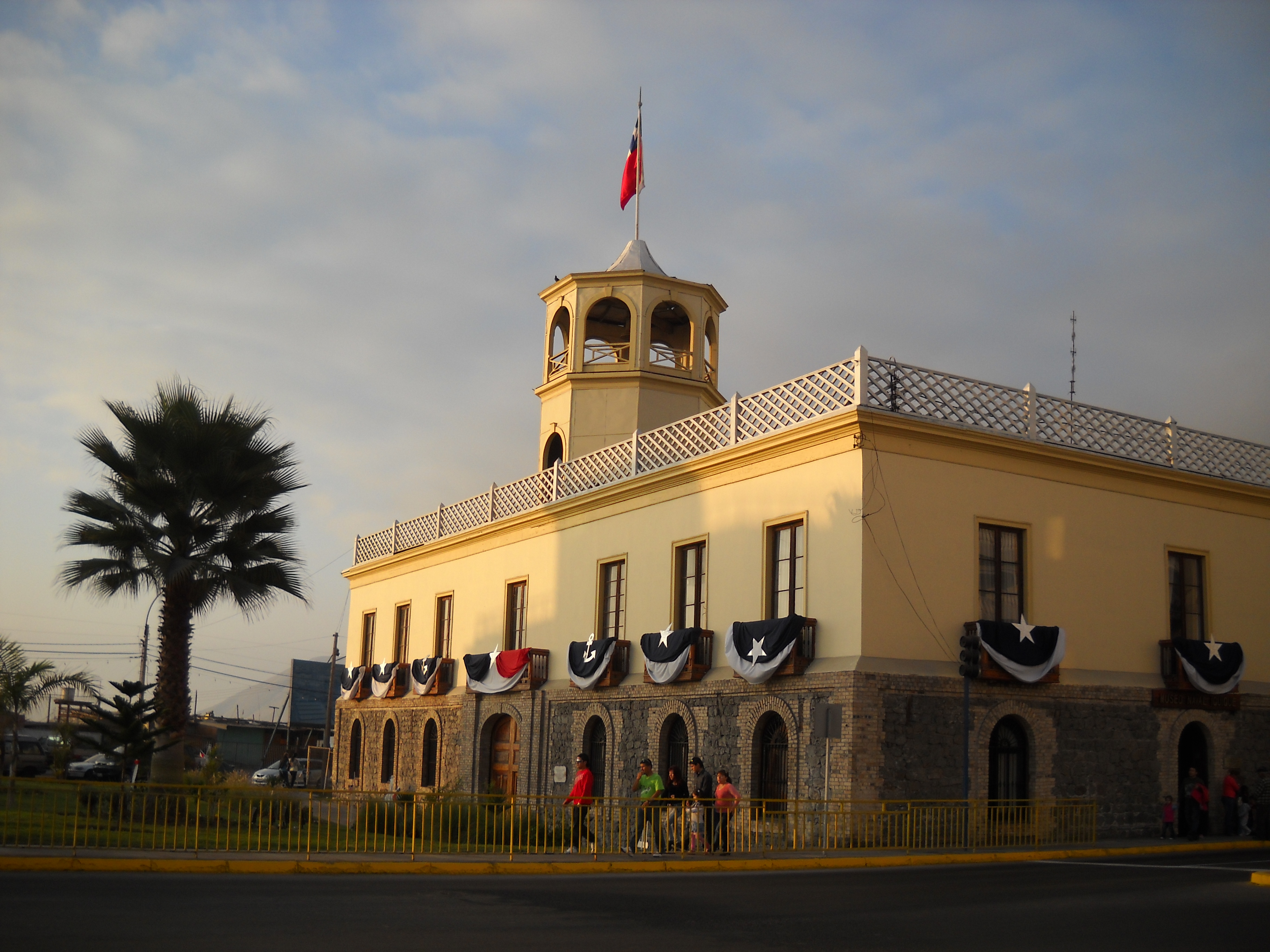 Palacio Rímac, ex Aduana de Iquique.